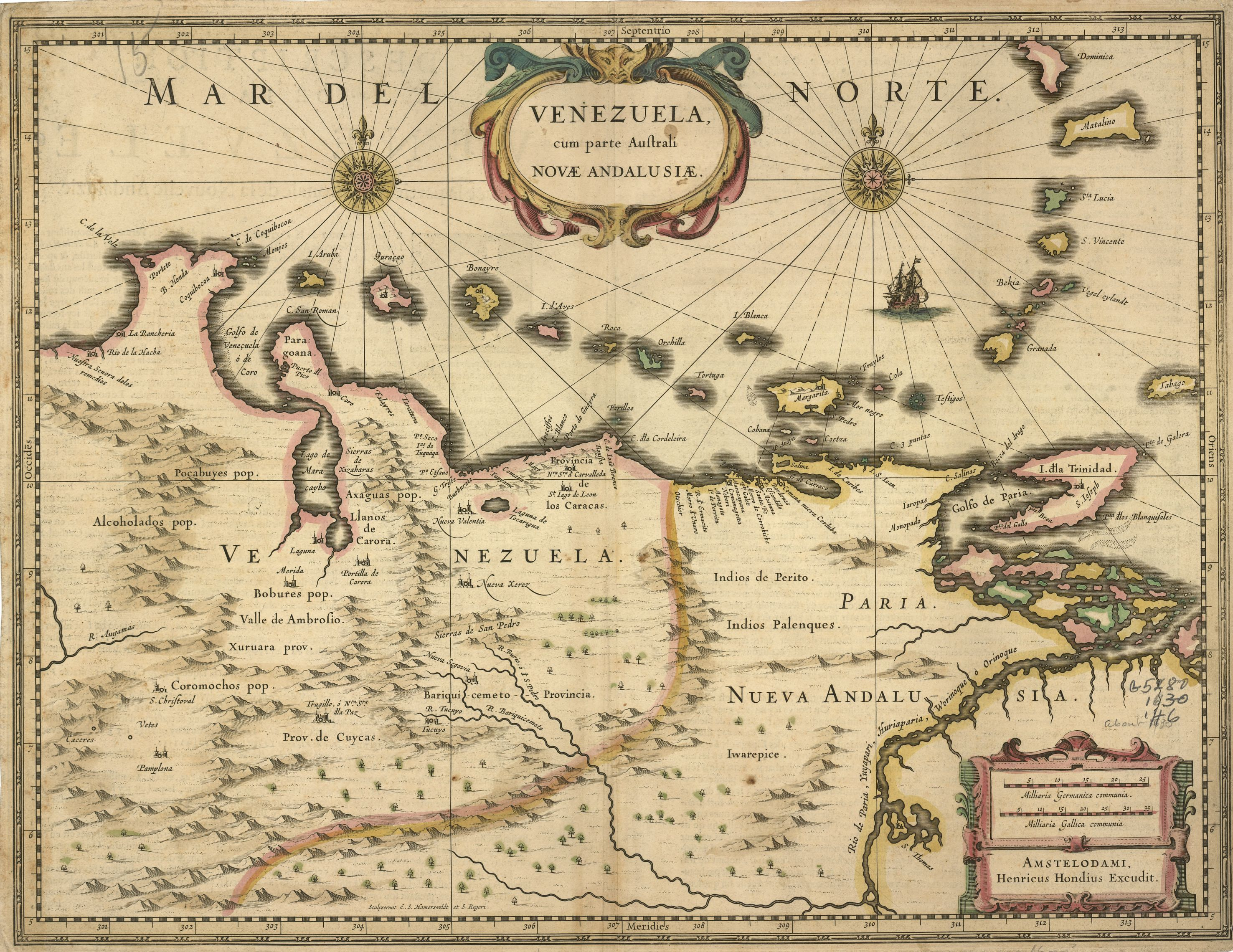 Mapa: buril de 37,4 x 49,4 cms. Escala ca. 1:3,000,000. E.S. Hamersveldt, S. Rogeri, grabador. Página de la obra Atlas sive Cosmographicae / G. Mercator. Amsterdam, 1595-1638. Escalas gráficas en millas comunes germánicas y gálicas. Latitud (N 15 —N 5 ). Coloreado a mano. Título, mención de responsabilidad y escalas gráficas enmarcados en viñetas. Montado sobre passe-par-tout 56 x 71 cms. Mapa físico, político y etnográfico. Muestra parte de Nueva Granada, Provincia de Cuicas, Antillas menores y parte de Guayana. En el reverso: Notas